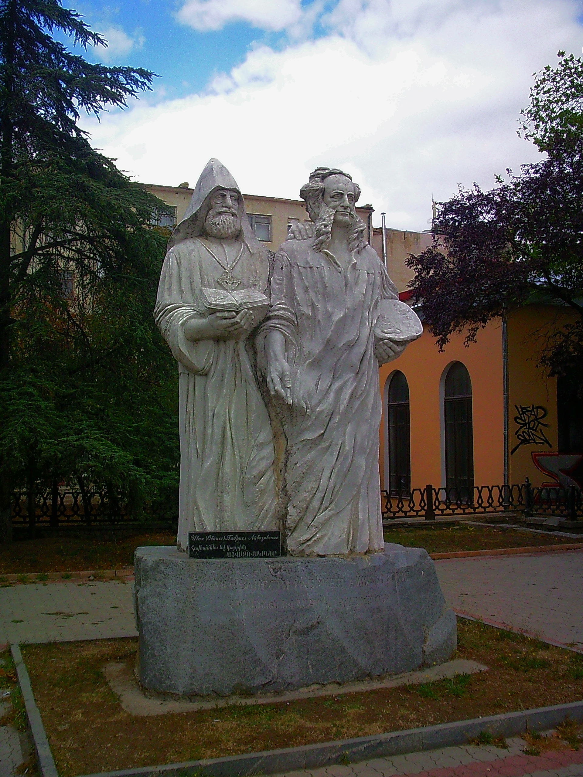 Памятник братьям Айвазян в Симферополе